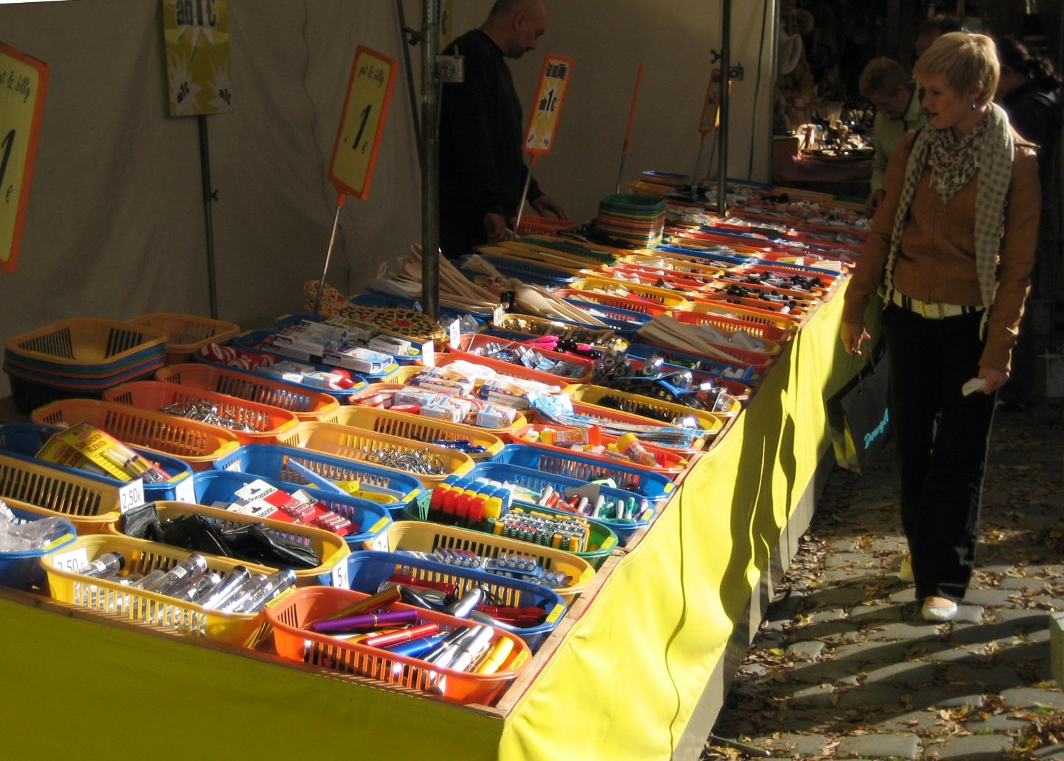 Herbstdult 2010 in Augsburg, verschiedener Krimskrams, den man immer brauchen kann